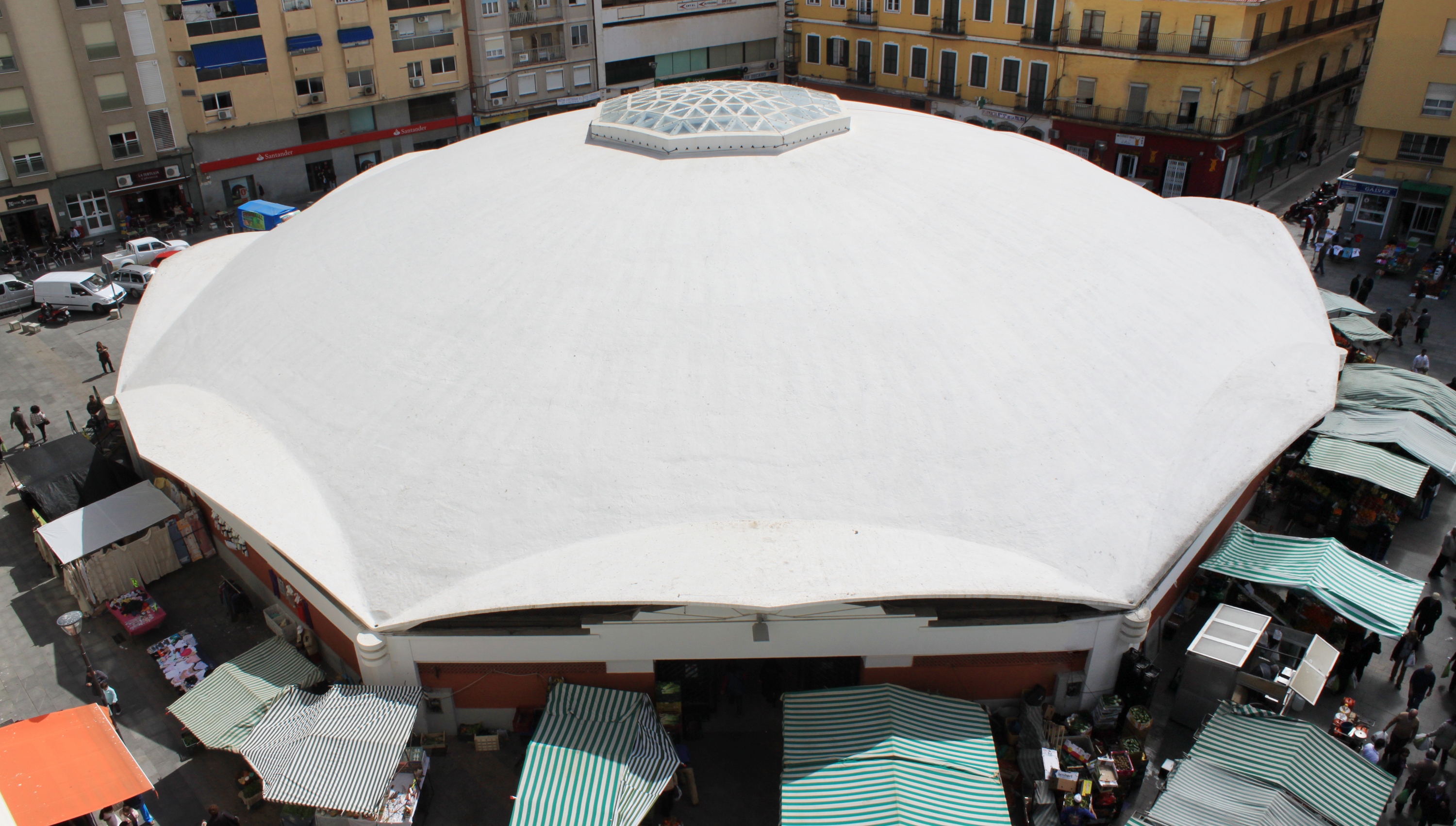 Mercado de abastos Ingeniero Torroja de Algeciras, España.